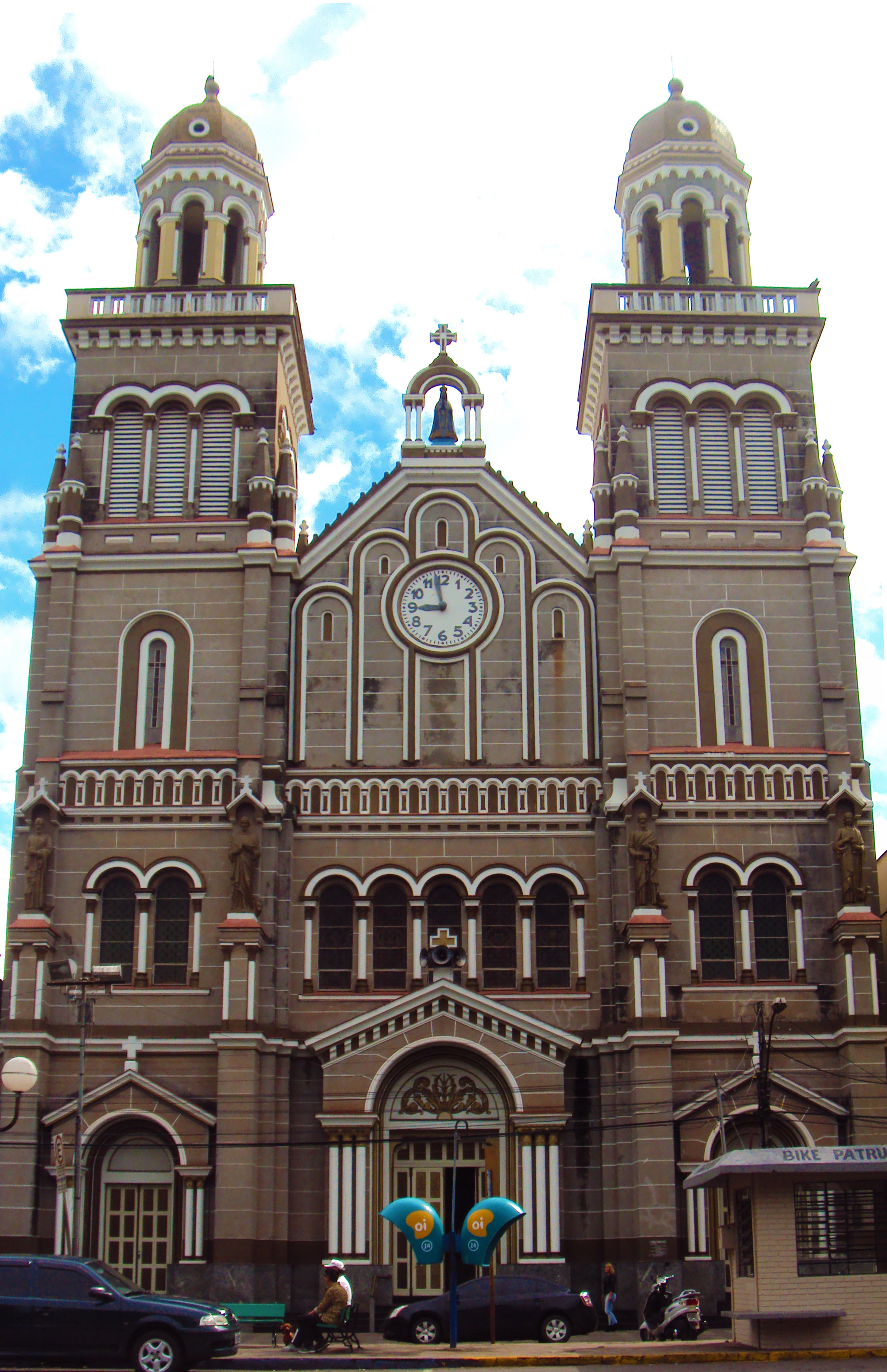 Igreja Matriz de Passo Fundo, 4 de março de 2014